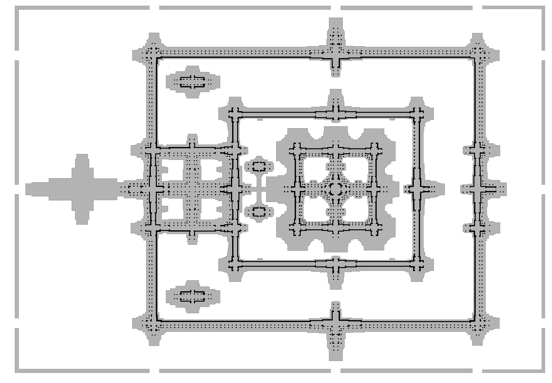 Croquis de la planta de Angkor Wat